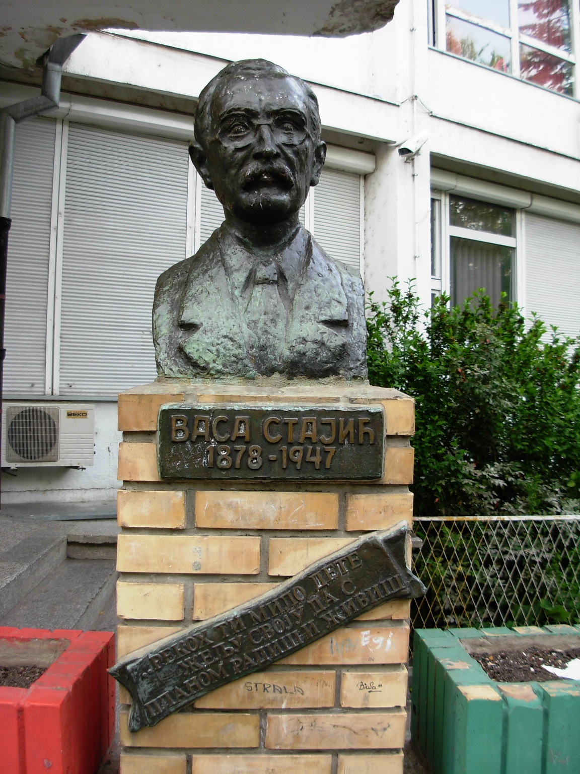 Bista Vase Stajića ispred osnovne škole "Vasa Stajić" u Novom Sadu.